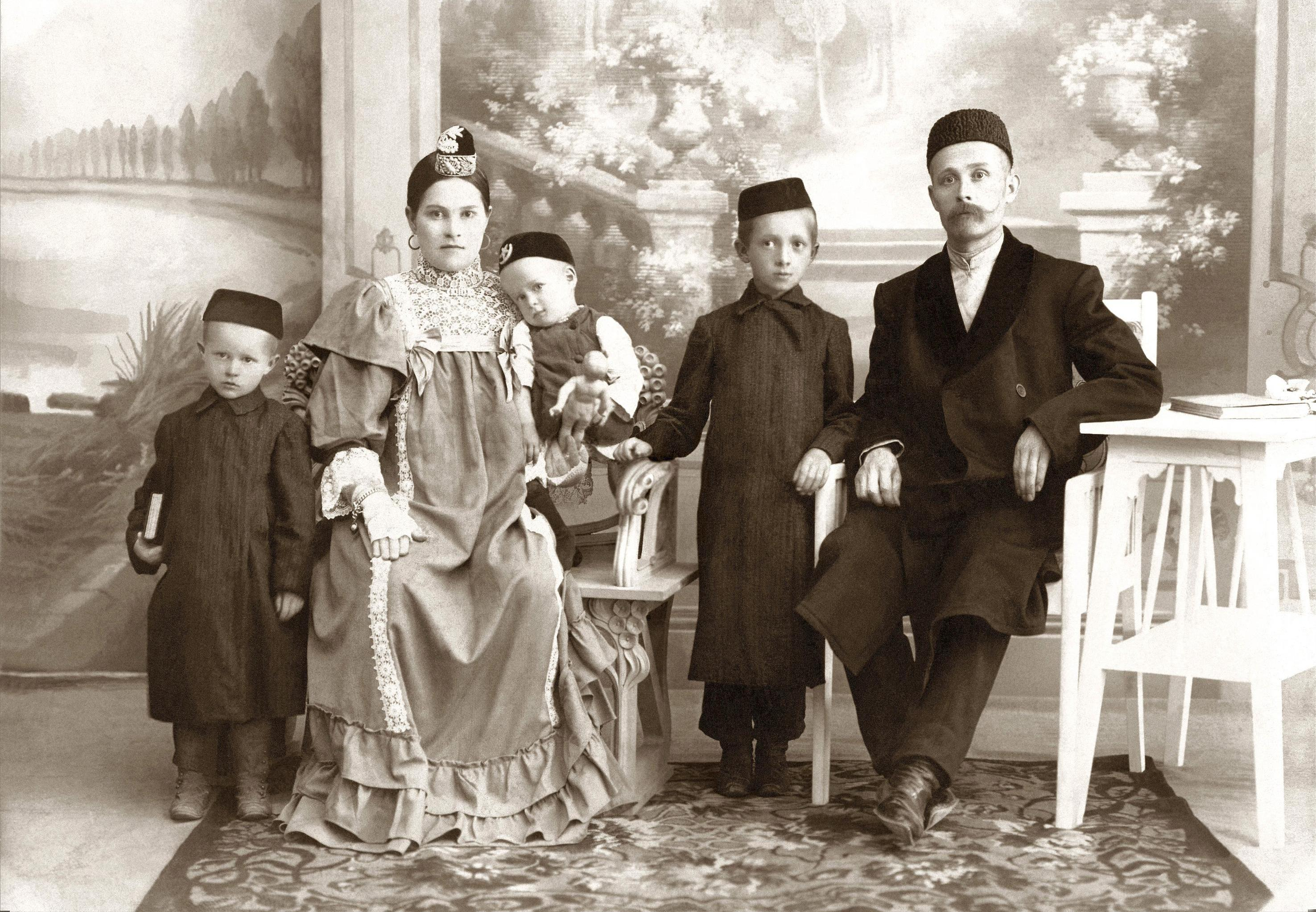 Шакир Загидуллин, управляющий торгового дома купца А. Хакимова (г. Уфа), с женой и сыновьями. Слева — Зариф Загидуллин (1904—1982), будущий профессор-терапевт.